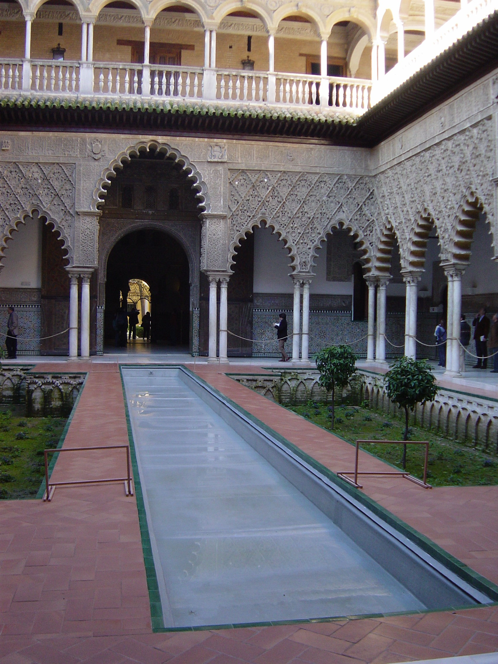 アルカサル、セビーリャ、スペイン